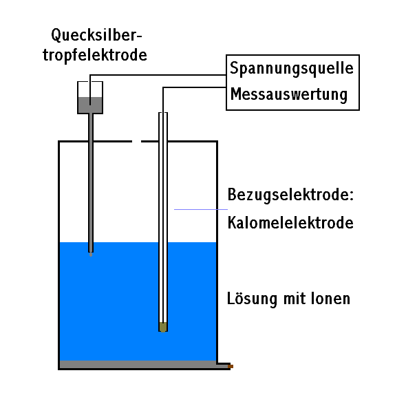 Schéma polarografu